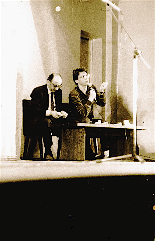 Гдлян и Додолев на творческом вечере (Москва, 1991)